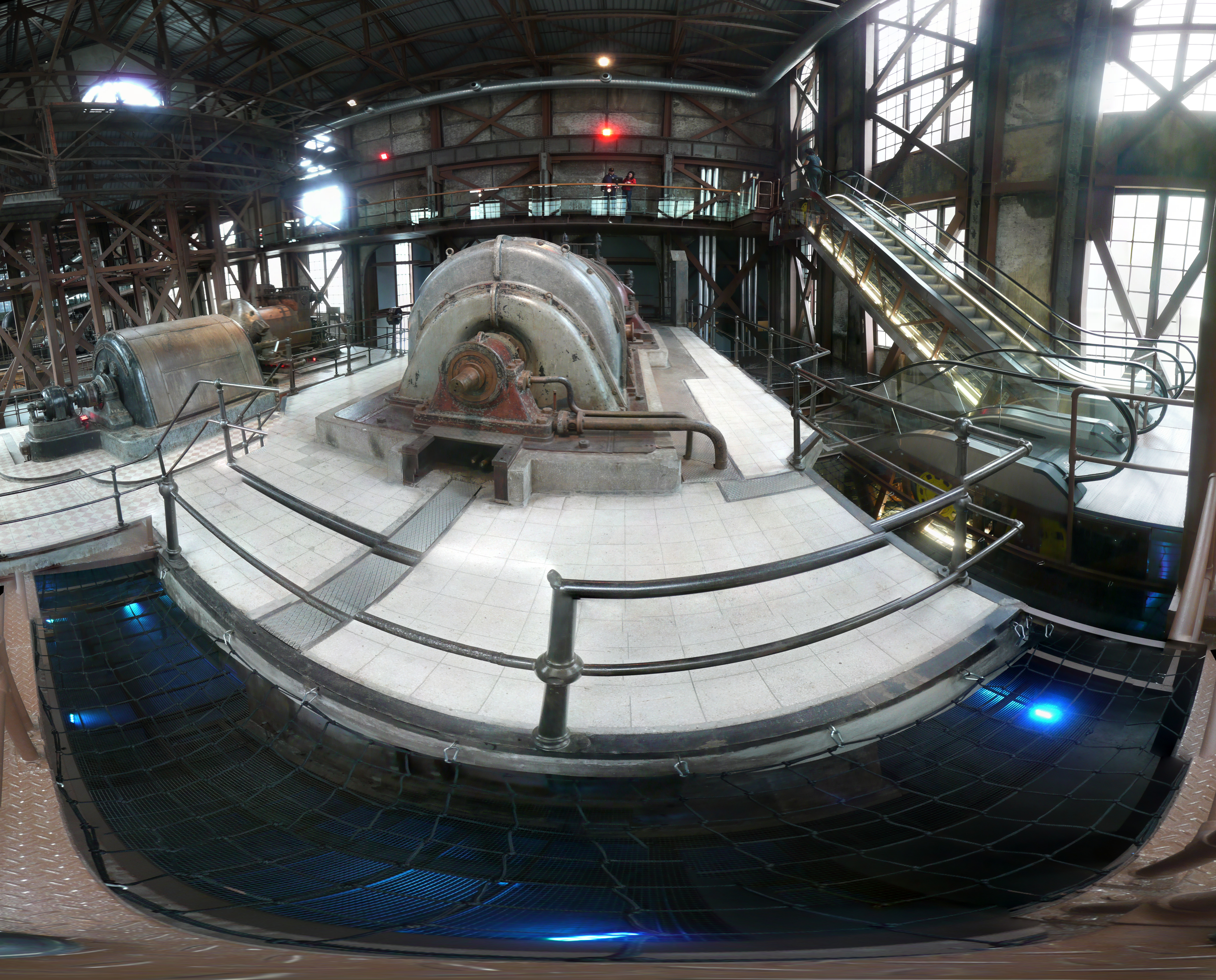 Santral Istanbul - OpenStreetMap (Info)